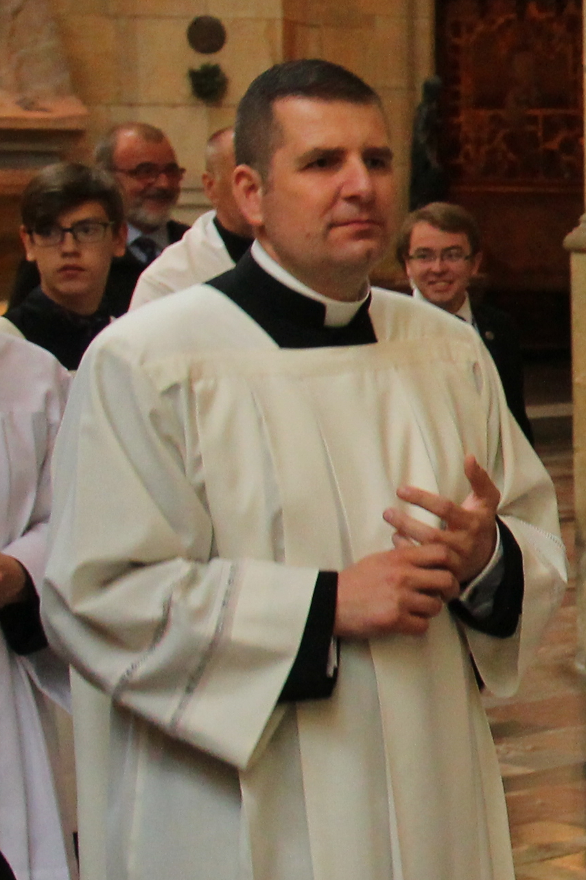 Vojtěch Mátl, průvod při biskupském svěcení Zdenka Wasserbauera